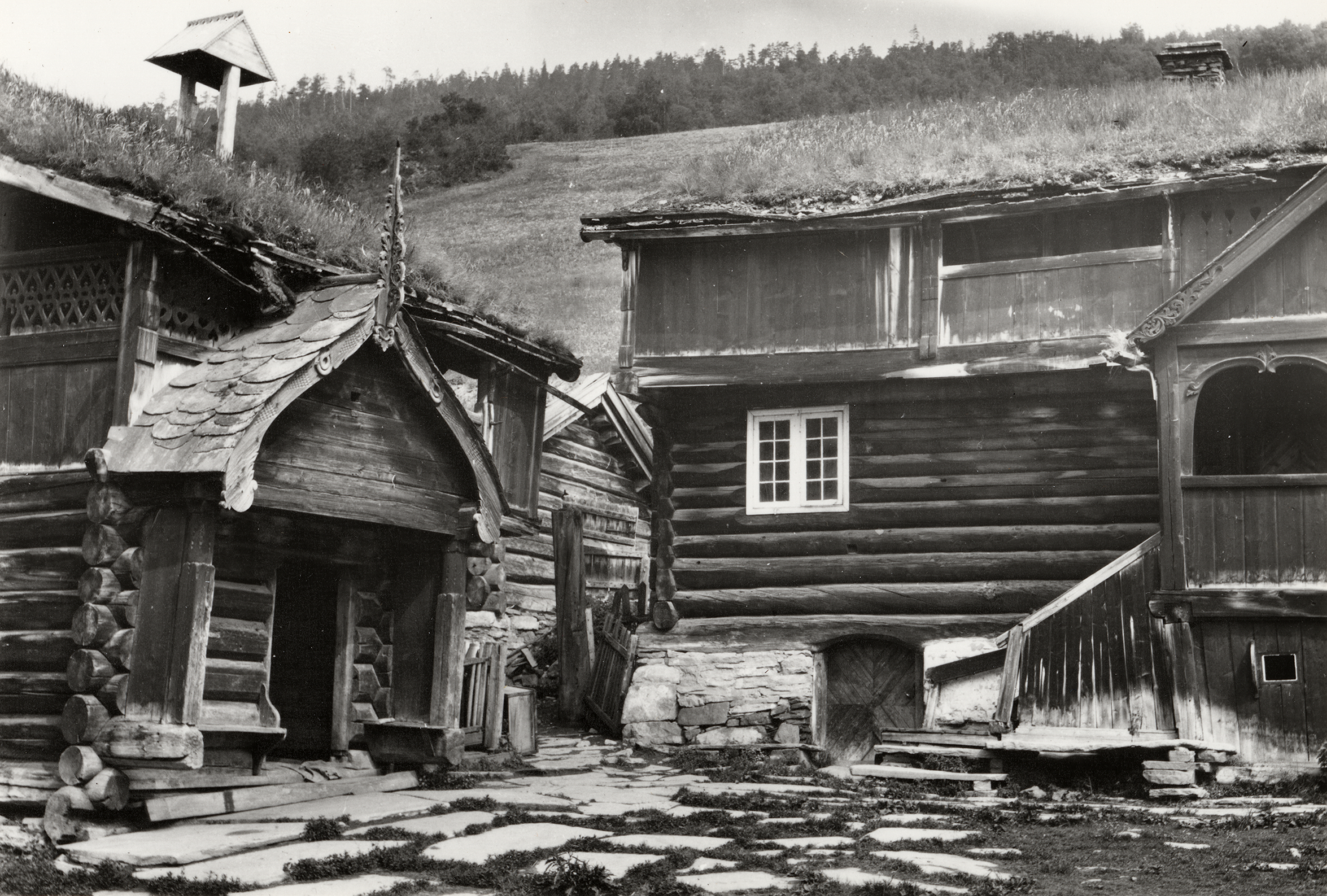 Bjølstad i Heidal, Oppland